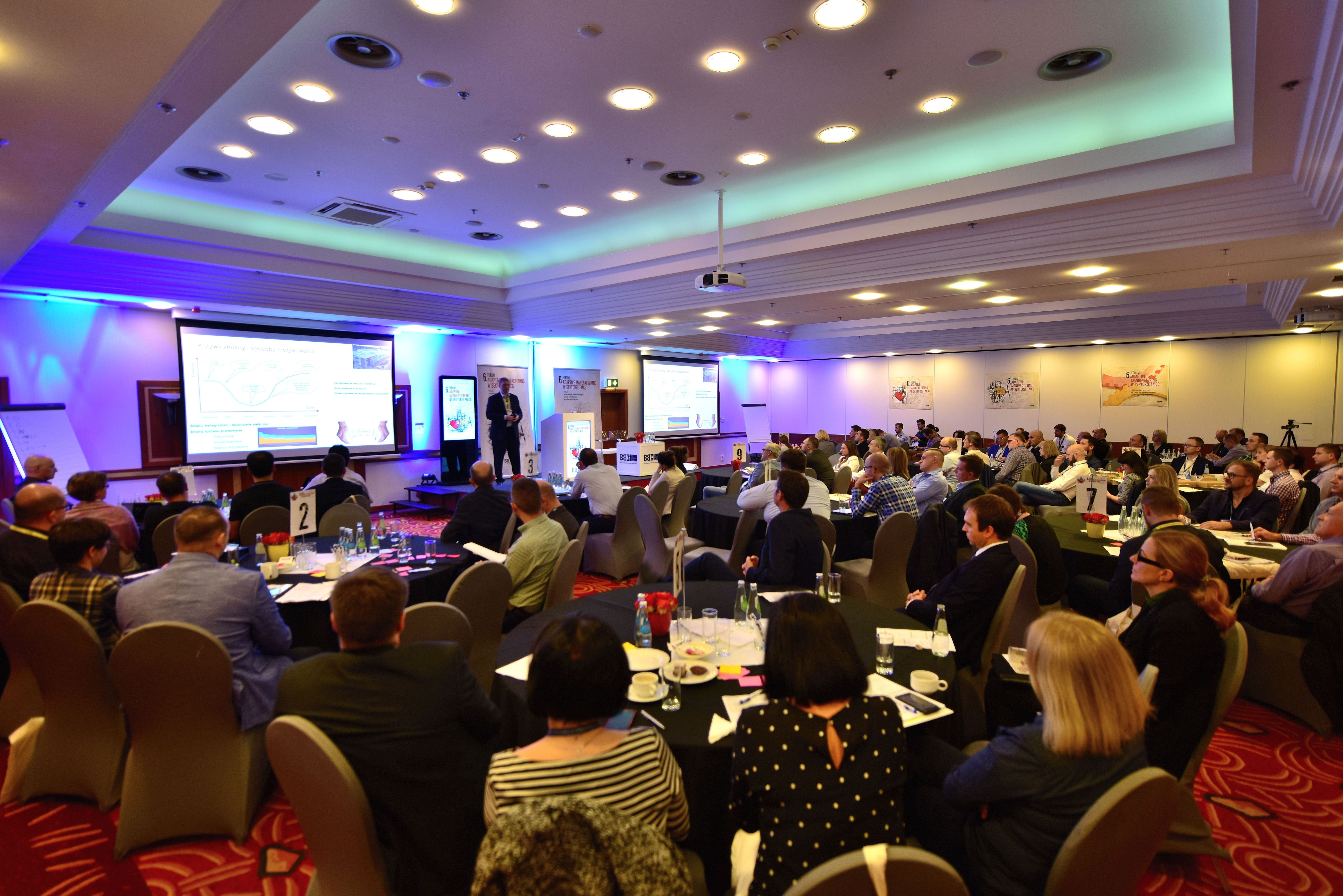 6 Forum Adaptive Manufacturing w sektorze FMCG w hotelu Courtyard by Marriott Warszawie